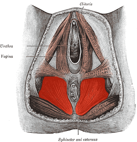 Levator ani (female)